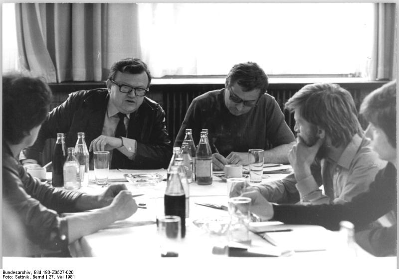 ADN-ZB Settnik-27.5.81-eng-Berlin: Abgeordneter - Ein Wahlgespräch mit Mitgliedern der Jugendkommission des Gewerkschaftsverbandes Kunst führte am 26.5. Stadtverordneter Günter Wirth in der Komischen Oper. Dr.phil. Günter Wirth (2.v.l.) hat ein Mandat der CDU und kandidiert zum vierten Mal als Stadtverordneter. Er ist Chefredakteur der evangelischen Monatszeitschrift "Standpunkt"."